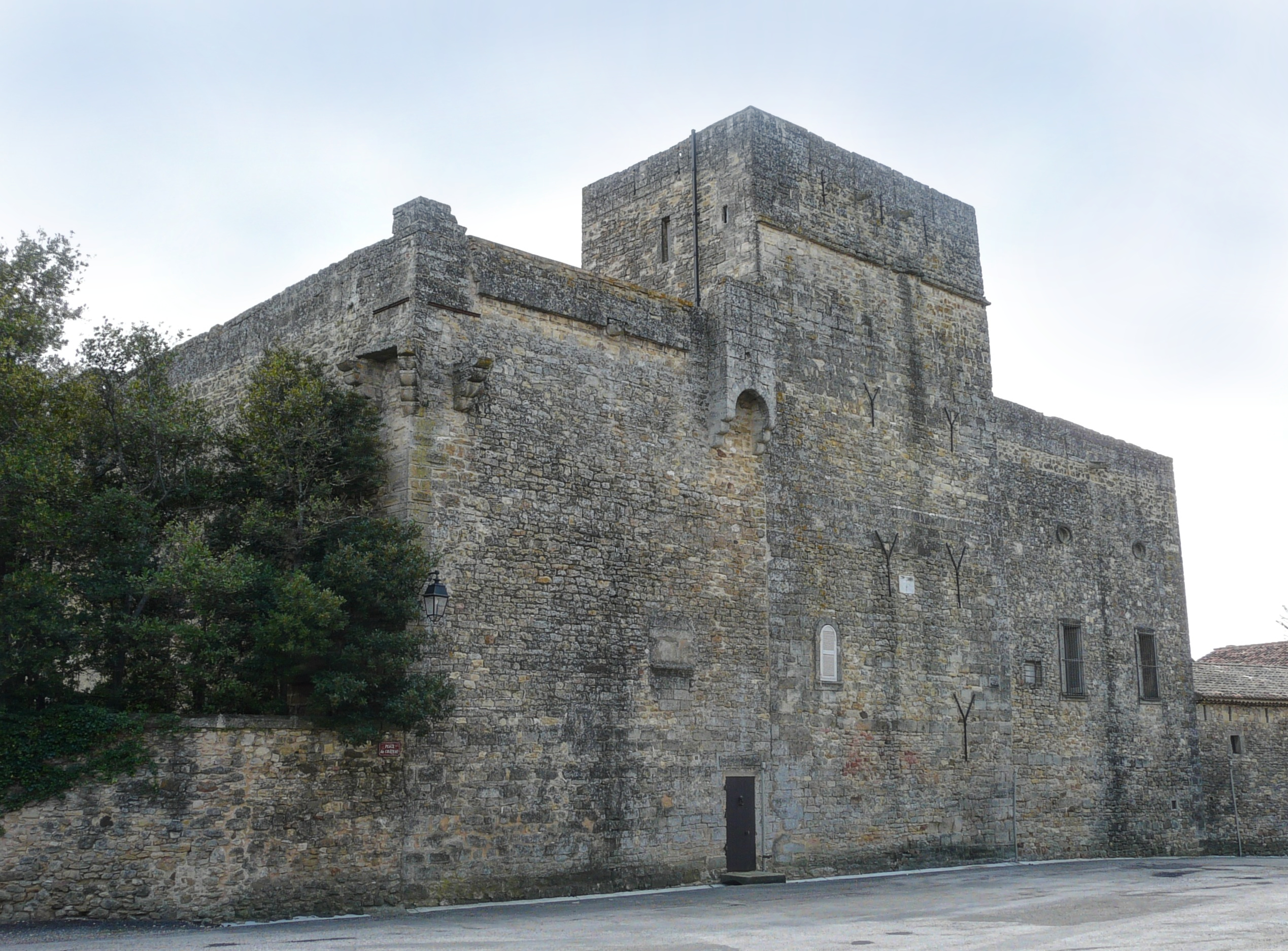 chateau de Fontarèches